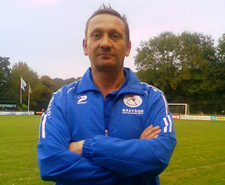 Peter Barendse